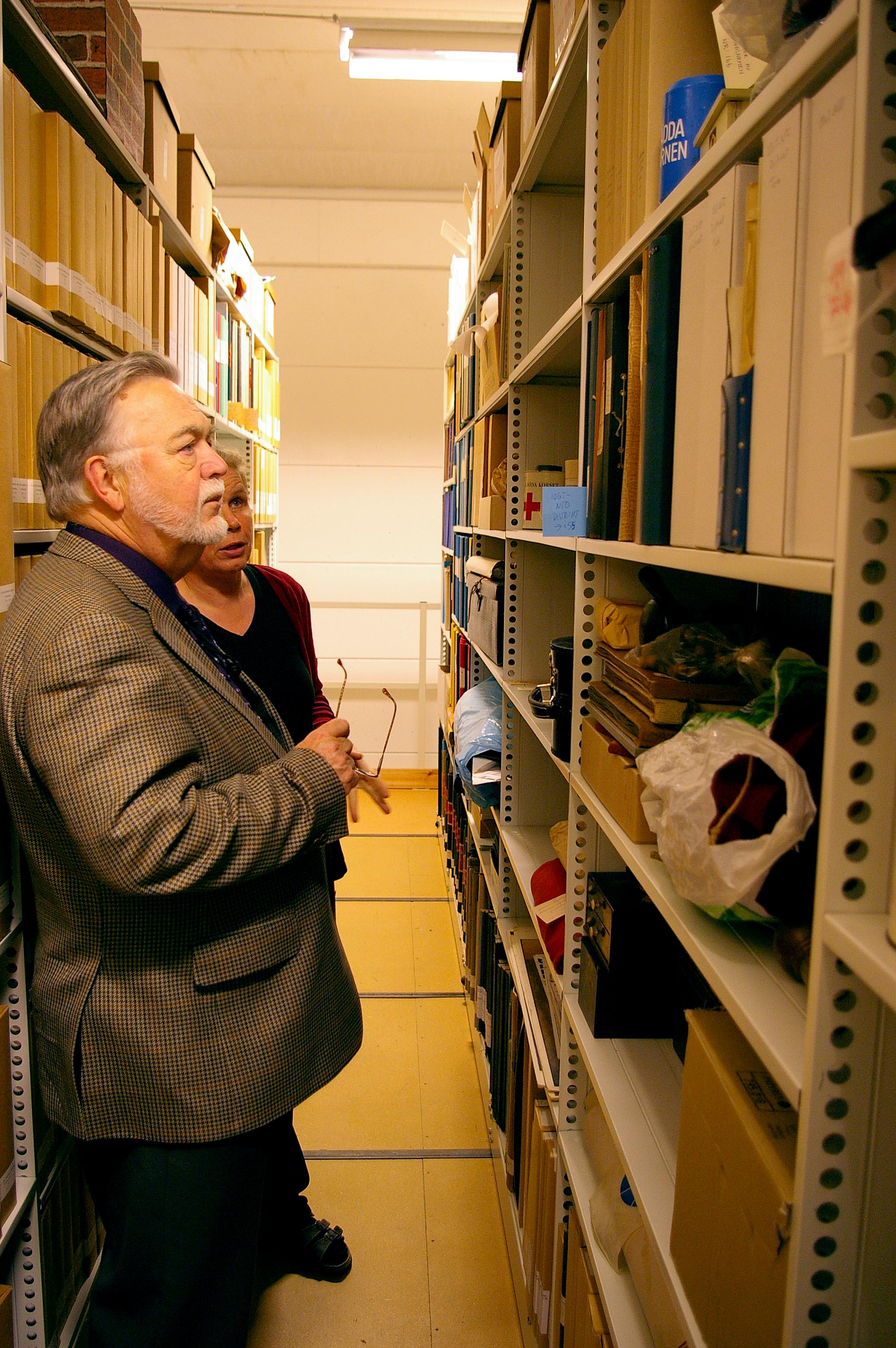 Skånes arkivförbunds lokaler i Lund, Sverige.